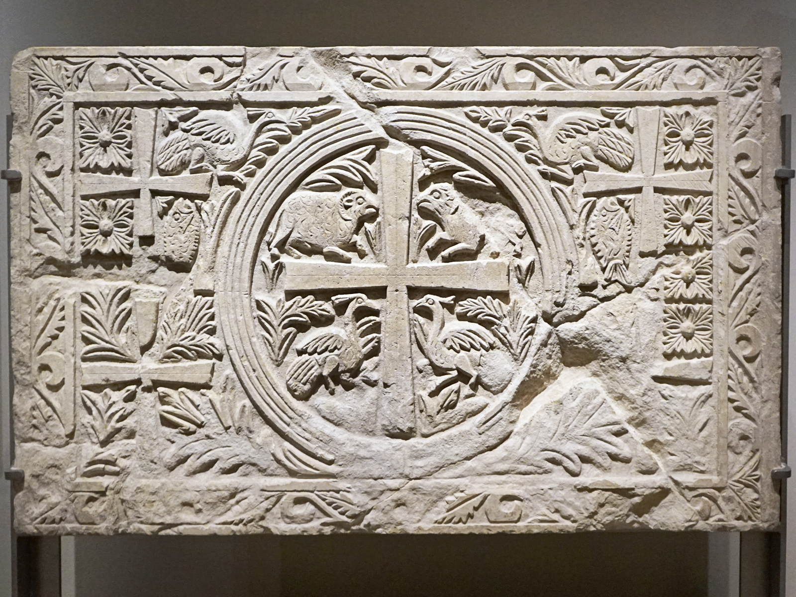 Dalle de Chancel une dalle de chancel est un élément de clôture du choeur d'une église paléochrétienne. Zib (environs de Tyr) Liban, Vè-VIè siècle Calcaire Musée du Louvre, Paris, département des antiquités grecques, étrusques et romaines. Notice du musée du Louvre Oeuvre présentée dans l'exposition "Chrétiens d'Orient" à l'IMA, Paris Le site de l'exposition "Chrétiens d'Orient. Deux mille ans d'histoire" à l'Institut du monde arabe (IMA) à Paris